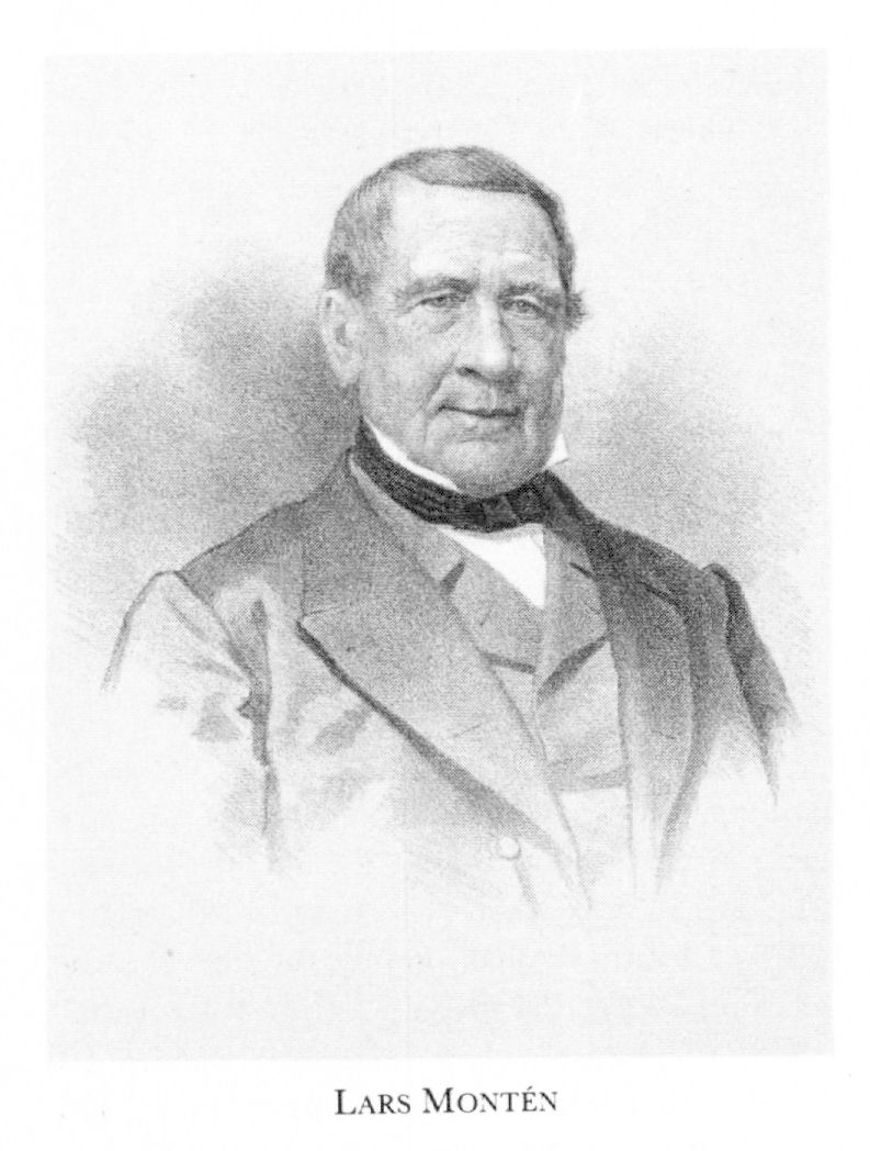 Lars Montén (1785-1872), grosshandlare, såpfabrikör, kommunalpolitiker, Stockholm